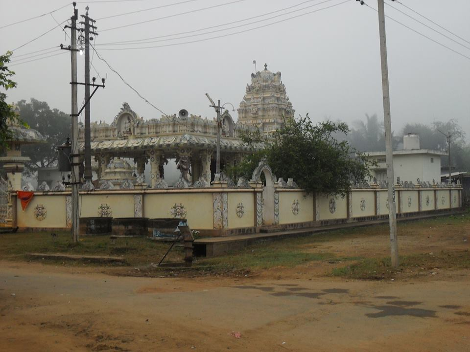 పడమట నర్సాపురం లోని శ్రీ సీతా రామచంద్ర స్వామి వారి దేవస్థానం